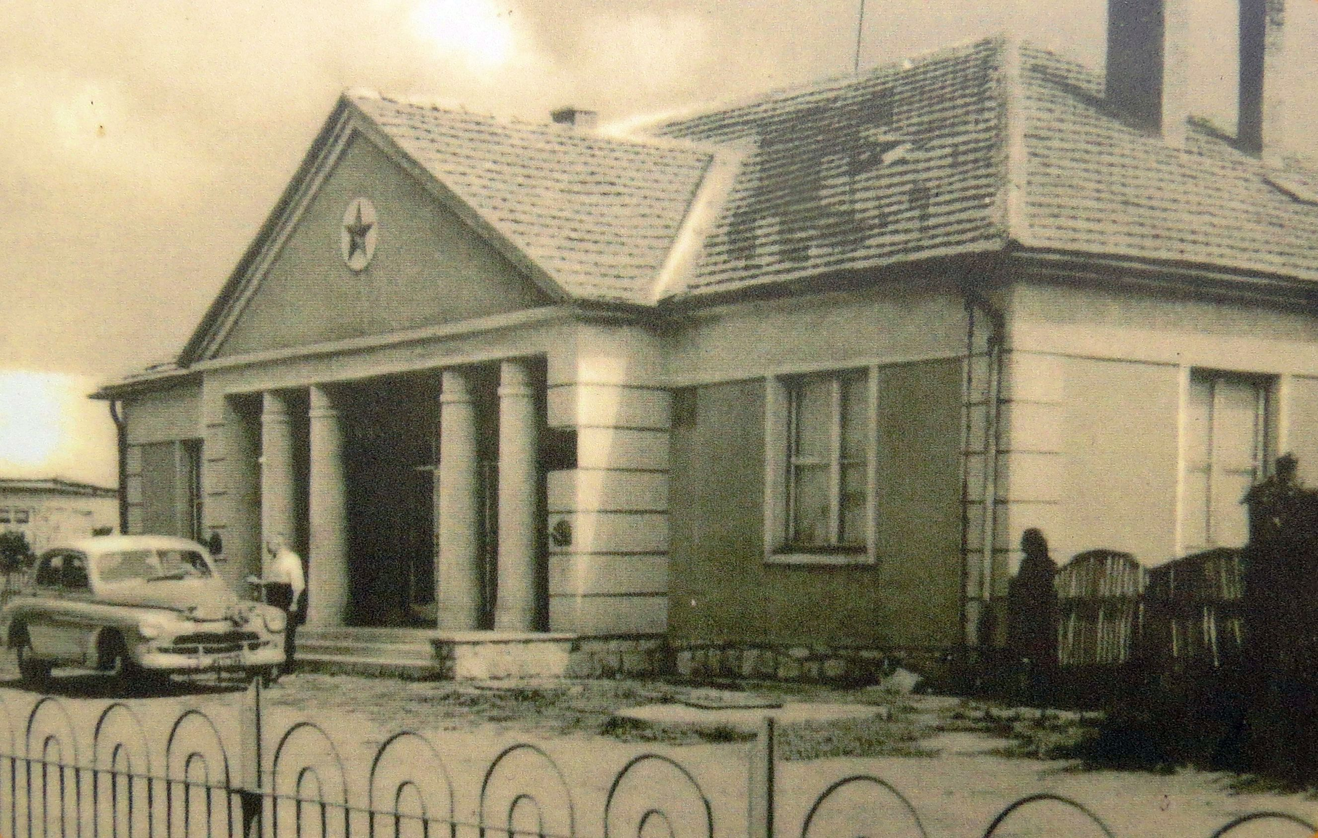 Az egykori pártház épülete Cigándon. A rendszerváltás óta varrodaként működik.